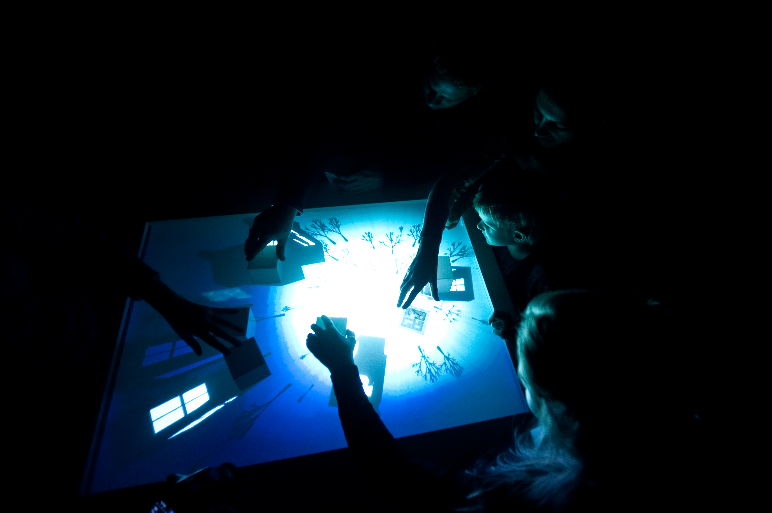 Фестиваль Yota Space 2010 - Joon Y Moon - инсталляция Augumented Shadow